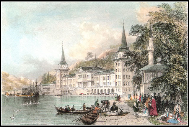 Kuleli Askeri Lisesi'nin Osmanlı devrindeki bir tablosu